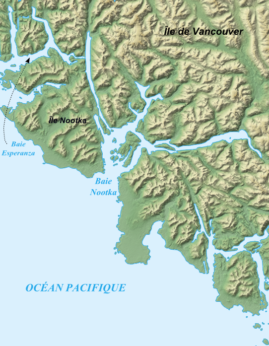 Sujet : Carte de la baie Nootka en Colombie-Britannique Origine des Données : site FTP du SRTM (Shuttle Radar Topography Mission) de la NASA. Visualisation des données : logiciel 3DEM de Visualization Software LLC. Projection : UTM. Logiciels de dessin : . Inkspace Format : PNG Méthode : Carte réalisée en s'aidant des didactitiels de Sting.